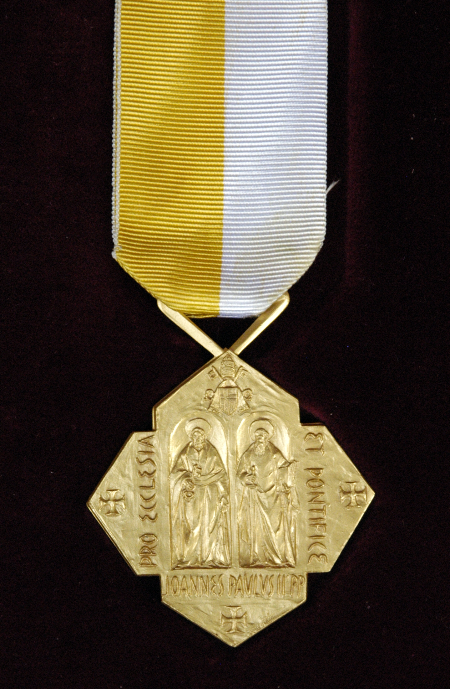 Päpstlicher Orden "Pro Ecclesia et Pontifice" neuere Version